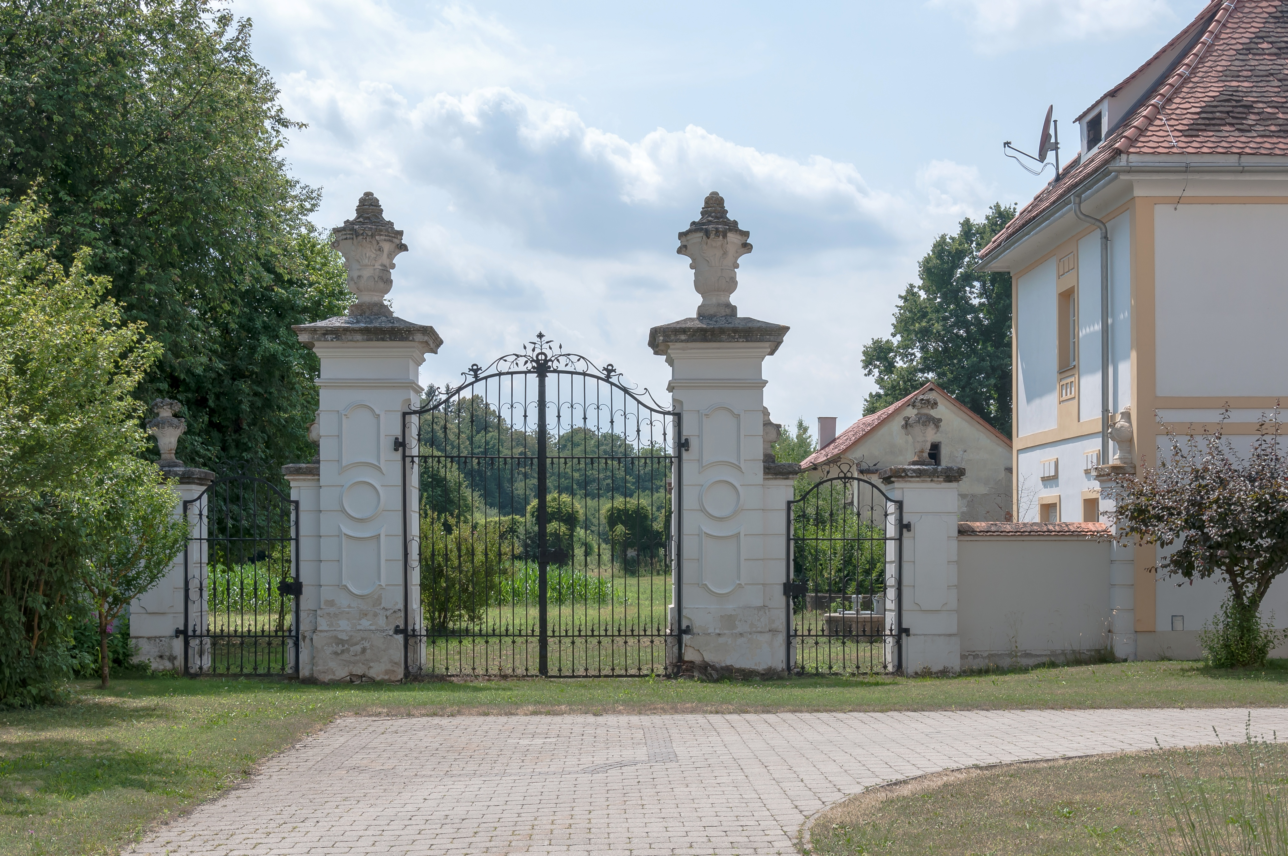 Das westliche Portal der Umfriedung des sogenannten Neuschlosses in Wundschuh.